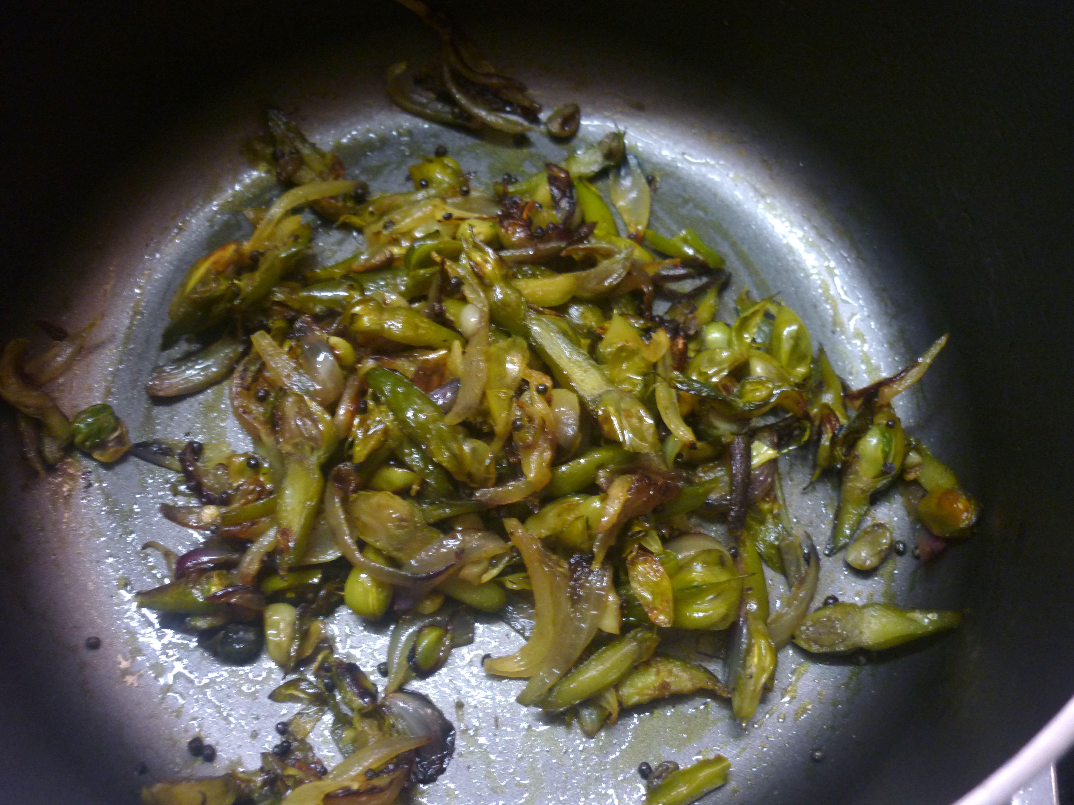 നിത്യ വഴുതന കൊണ്ടുള്ള ഒരു കറി